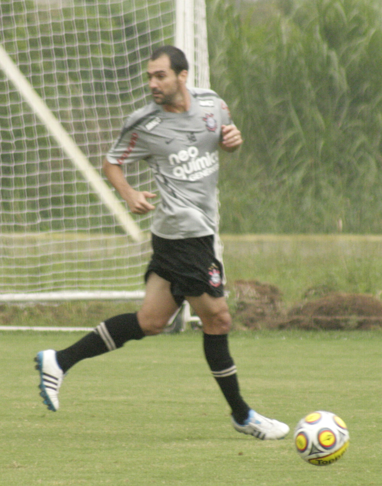 Danilo, jogador do Corinthians, durante o treinamento no CT Joaquim Grava, Itaquera.